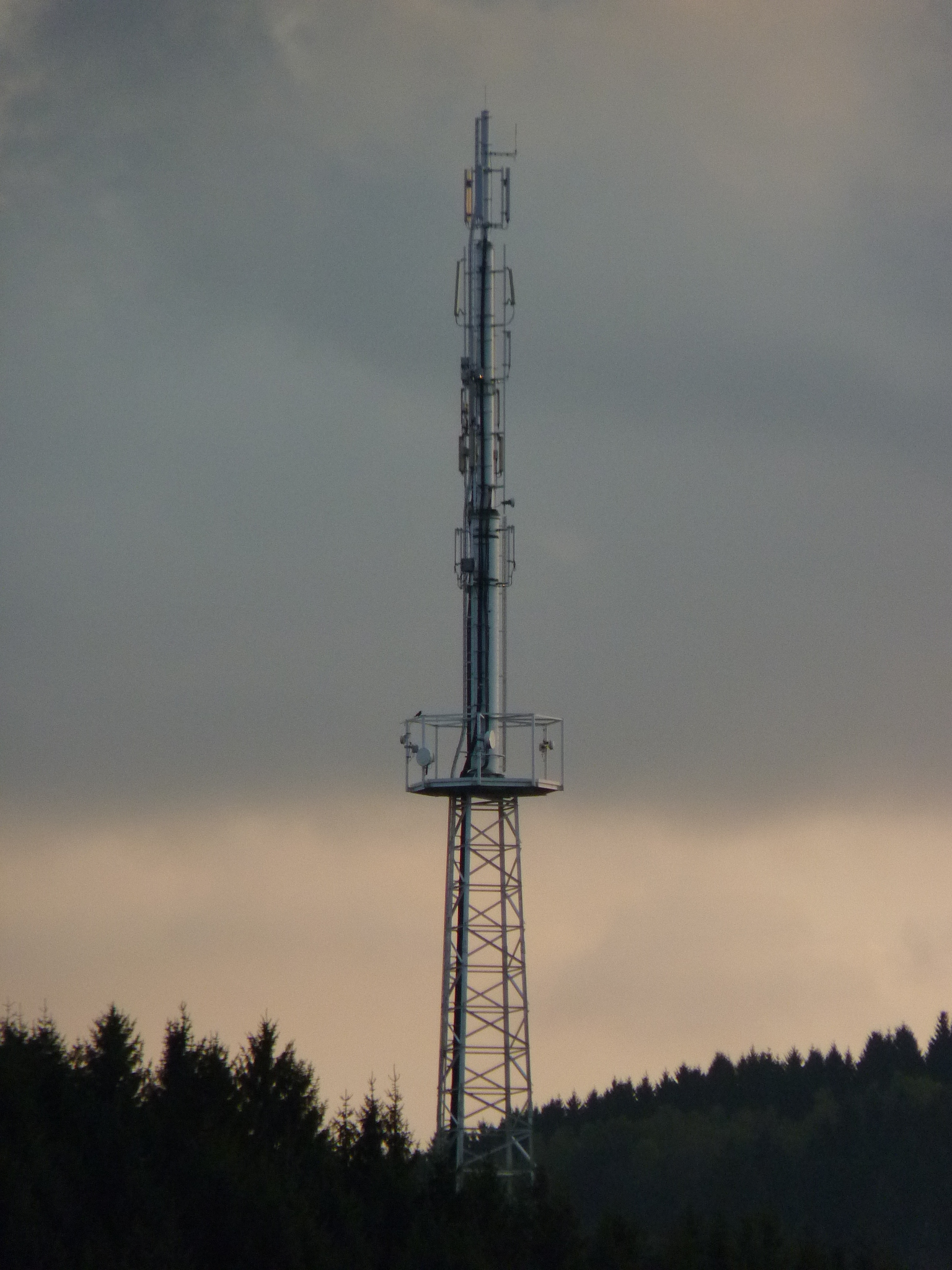 der Sendeturm auf dem Halsberg, einem Ausläufer des Berges Auf der Noll